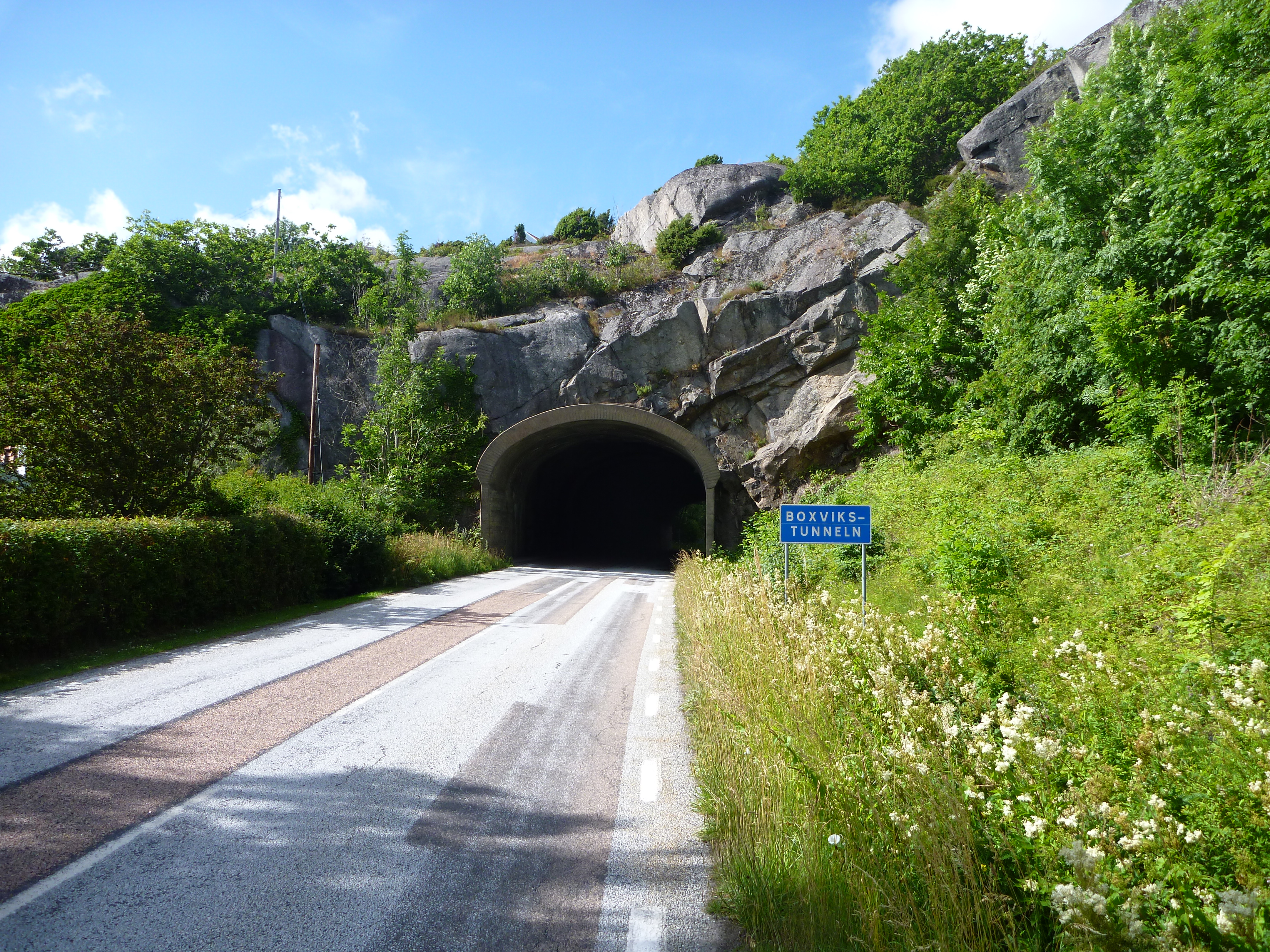 Boxvikstunneln från söder